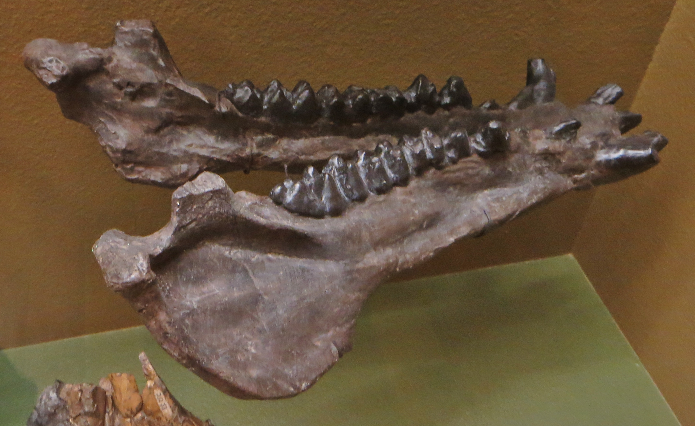 Fossil of Anthracotherium- Took the picture at Natural History Museum, Basel